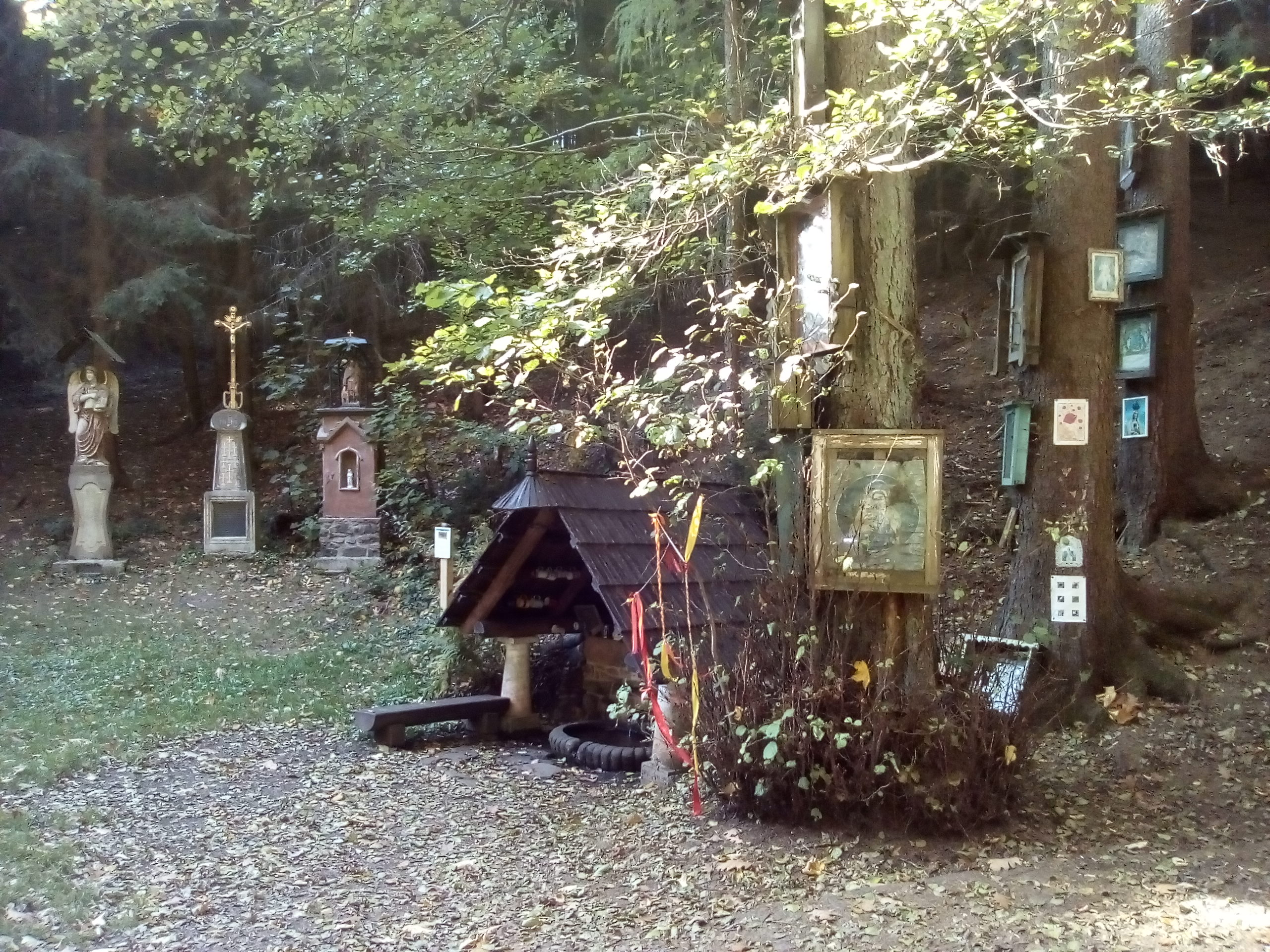 Skalákova studánka v Maternici nedaleko města Hronova